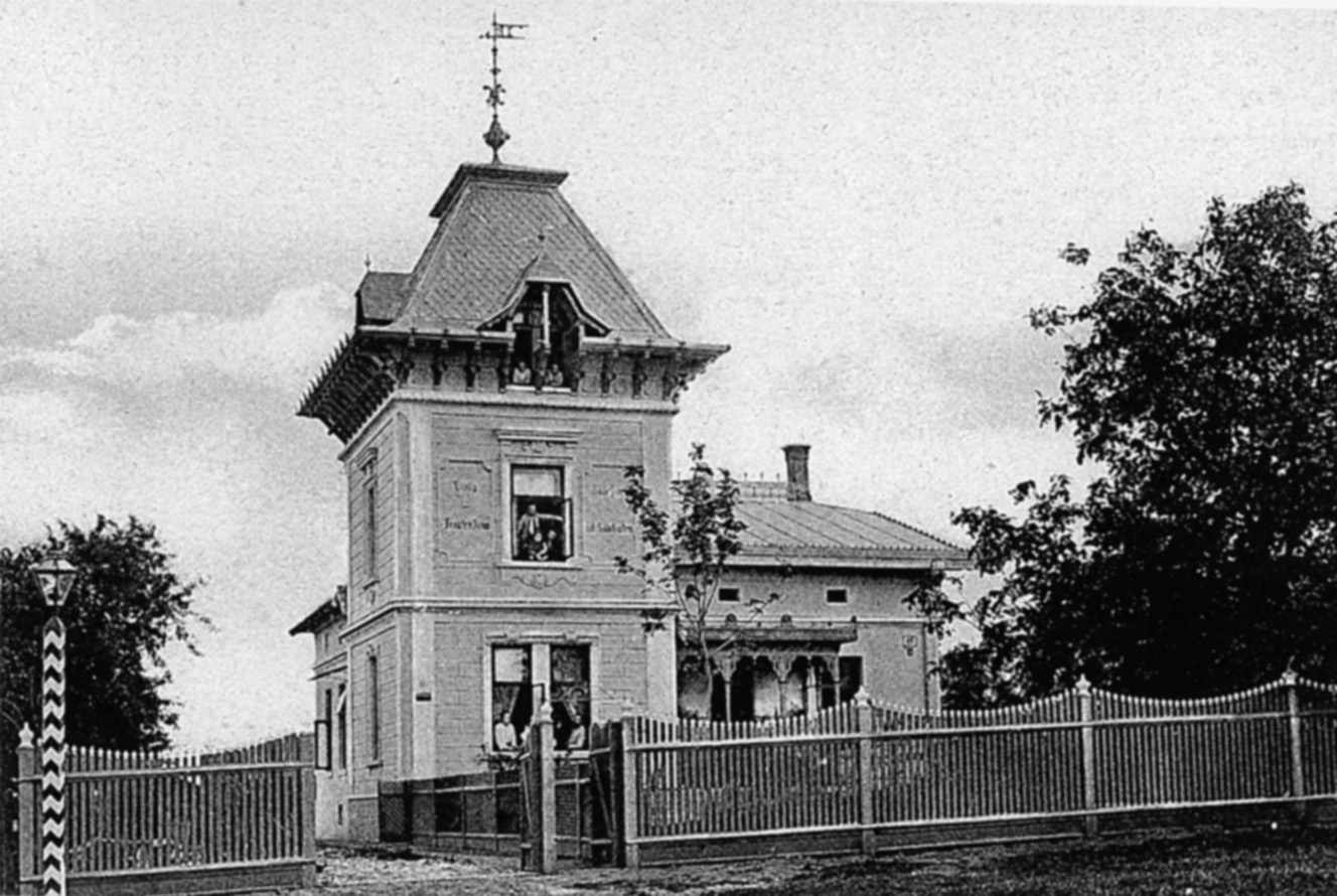 Вілла Йозефіне, архітектор Юлій Госбейн (1867—1941). Чернівці на розі Щербанюка і Достоєвського (колишній вул. Flurgasse 46)